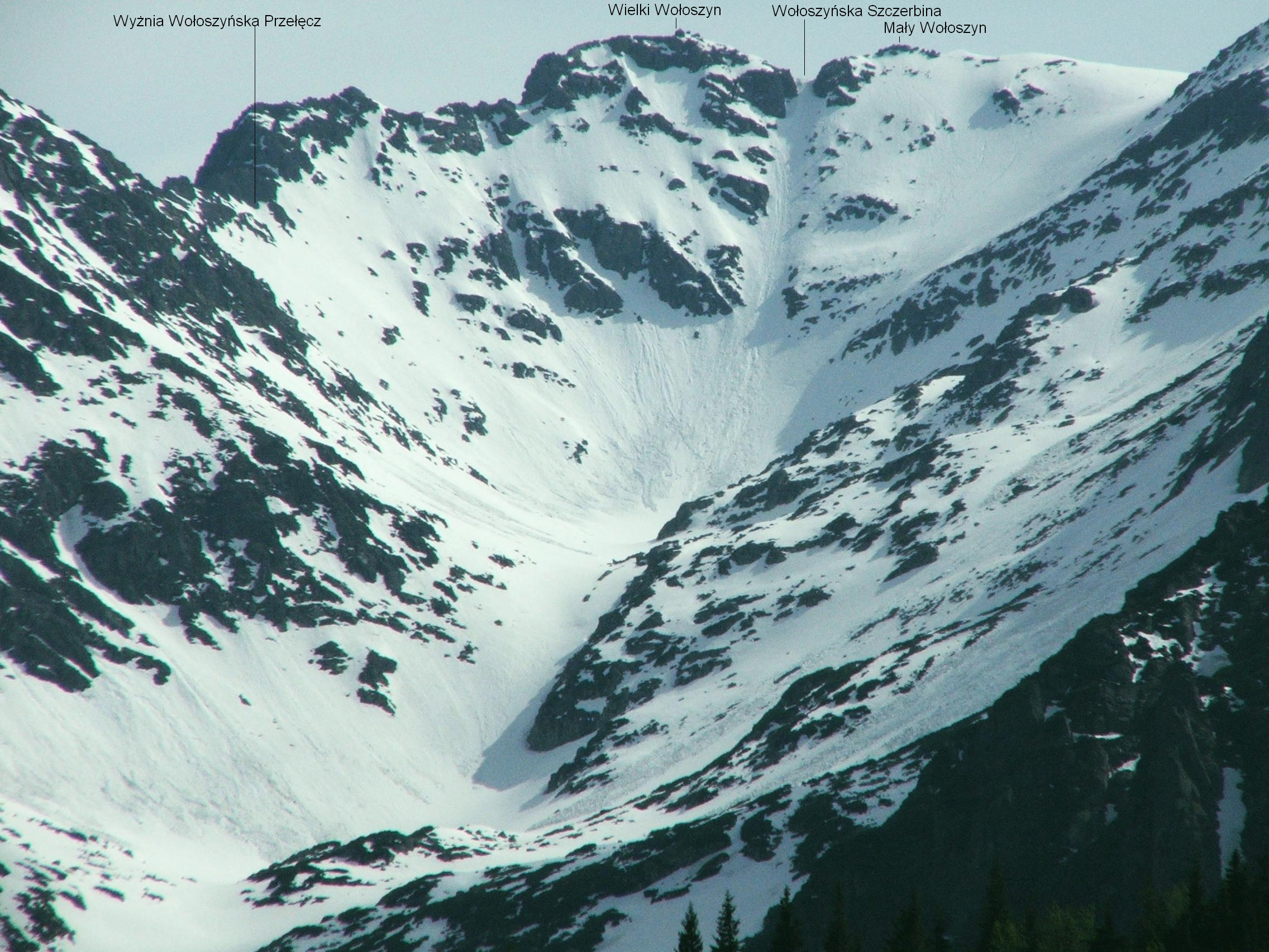 Widok z Gęśiej Szyi